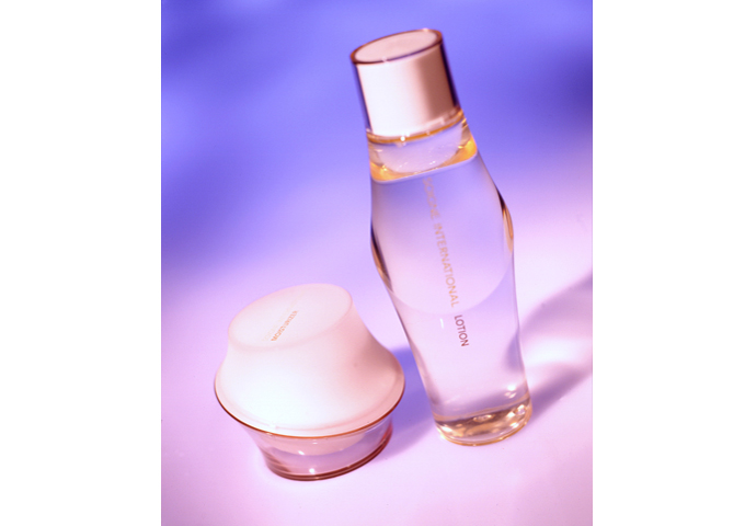 SOIGNE INERNATIONAL